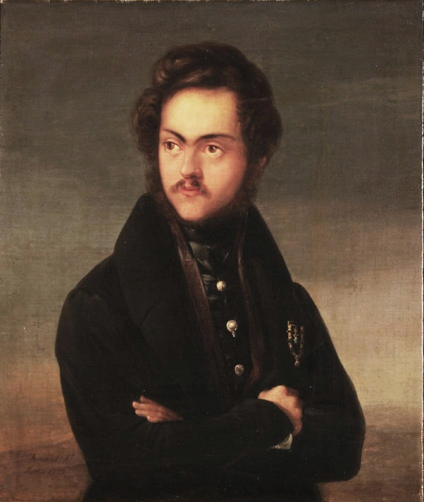 Retrato del infante de España Sebastián Gabriel de Borbón y Braganza (1811-1875), que era hijo del infante Pedro Carlos de Borbón y de María Teresa de Braganza y bisnieto del rey Carlos III de España.